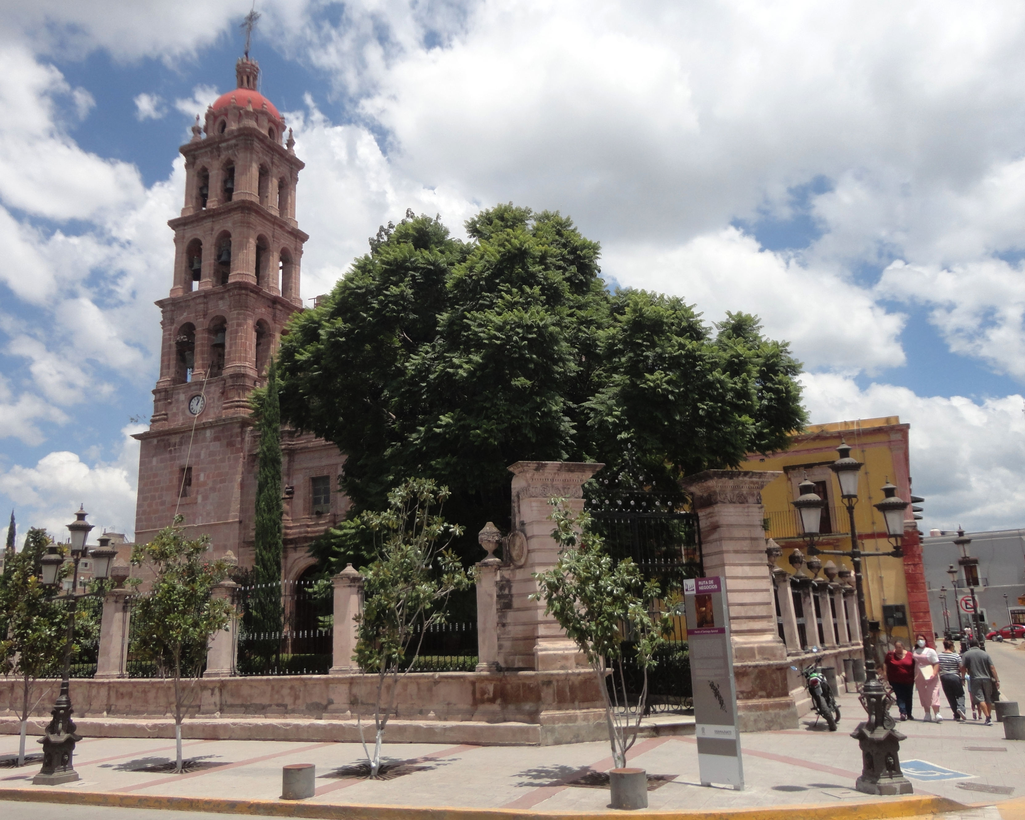 Parroquia de Santiago Apóstol - Silao, Guanajuato, México.